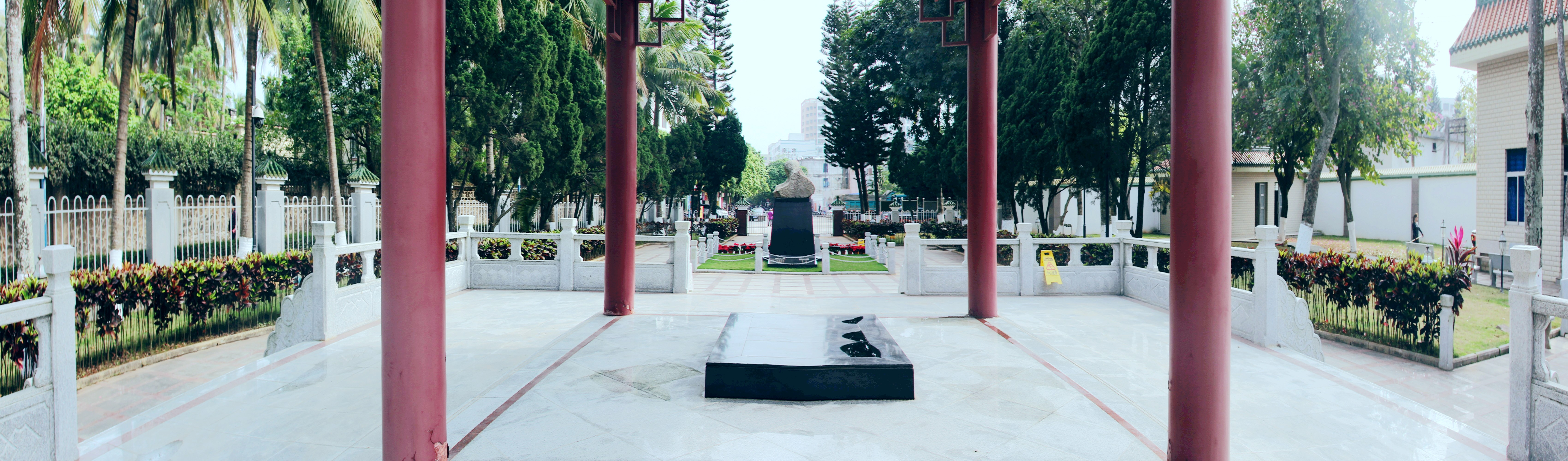 海南国际旅游岛——李硕勋烈士墓亭（宽幅）（南偏东）